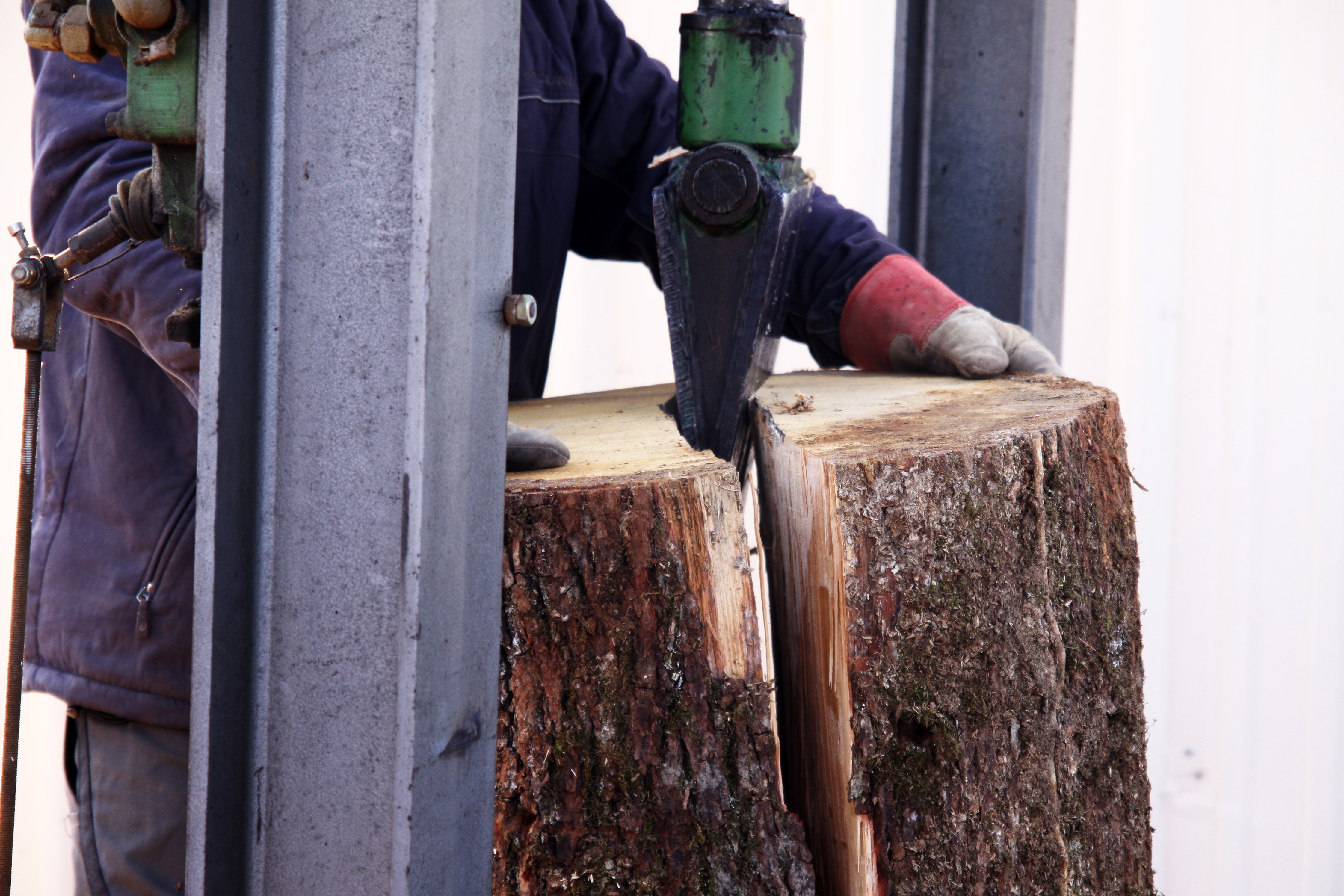 Tronc fendu avec un coin mécanique